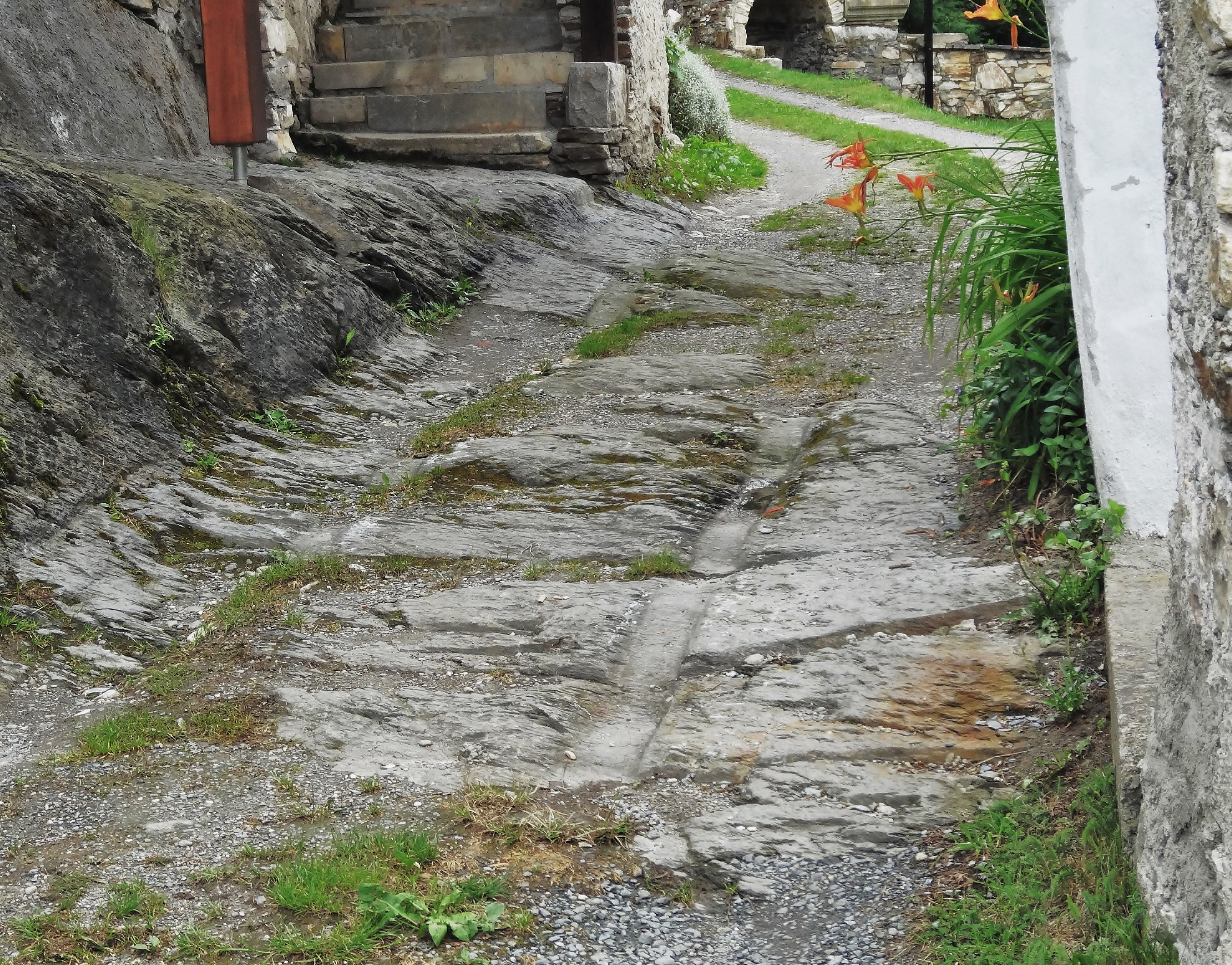 Wagenspuren im felsigen Weg neben der nördlichen Kirchhofsmauer der kath. Pfarrkirche Hl. Jakobus d. Ä. (Tiffen)